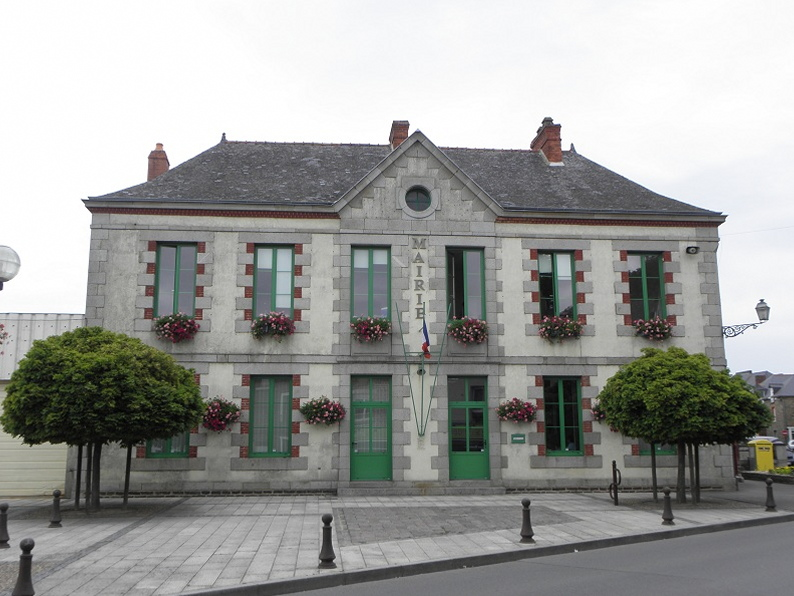 Mairie de Romillé (35).